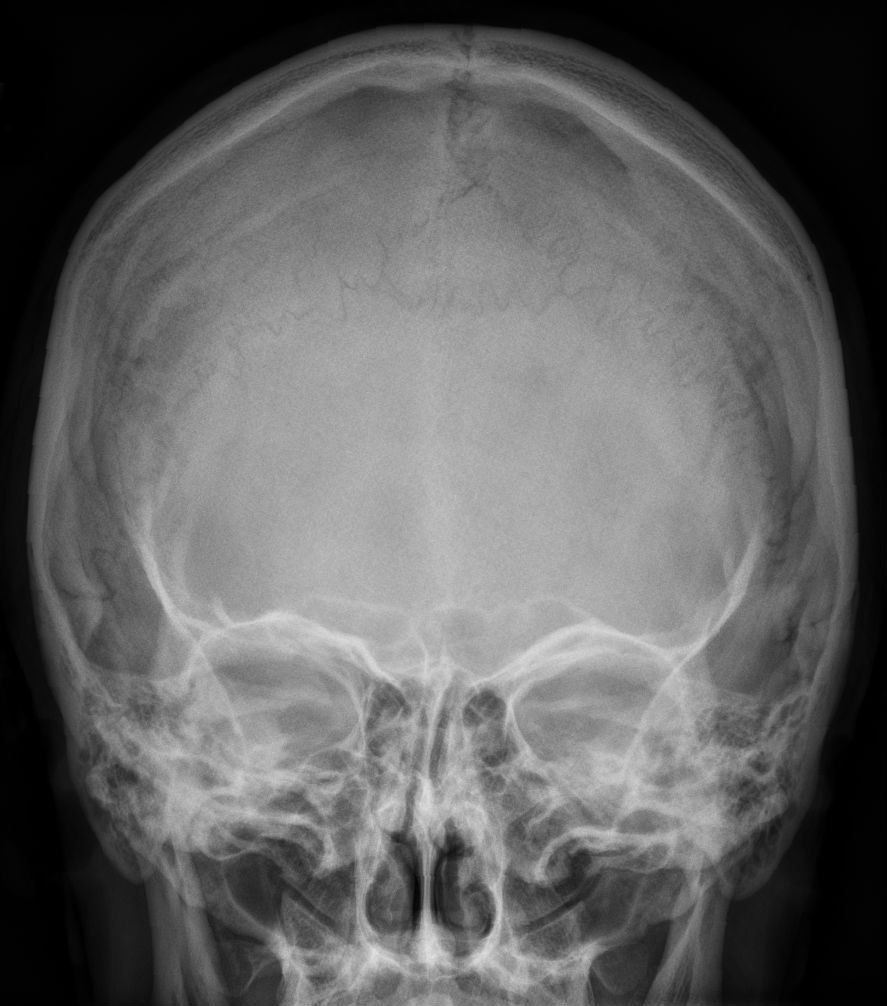 Röntgenaufnahme des Schädels mit Darstellung eines Inkabeins zwischen Os okzipitale und den Ossa parietales.